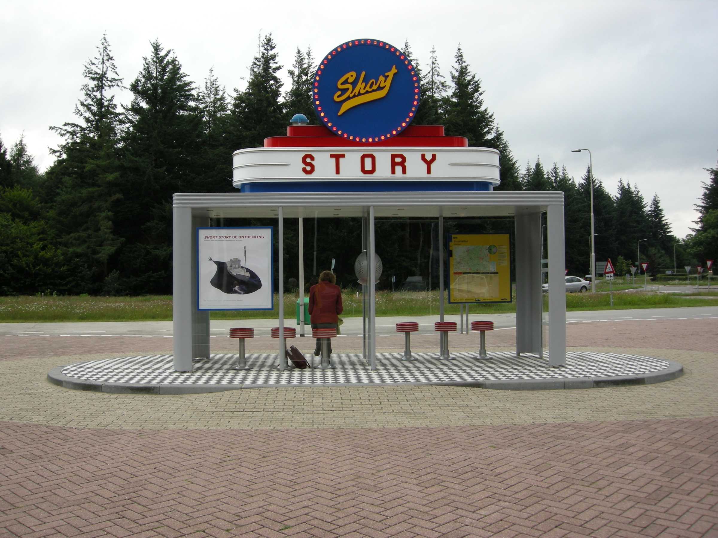 Het Short Story bushokje op transferium Wittenberg in Stroe